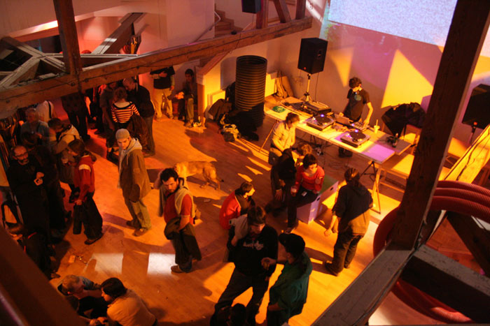 Prostor DigiLabu AVU